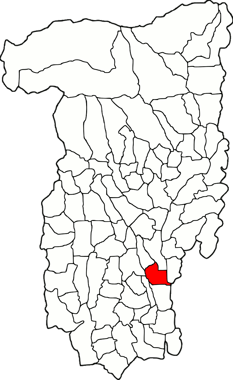 Lage der Gemeinde Orlești im Kreis Vâlcea (RO).